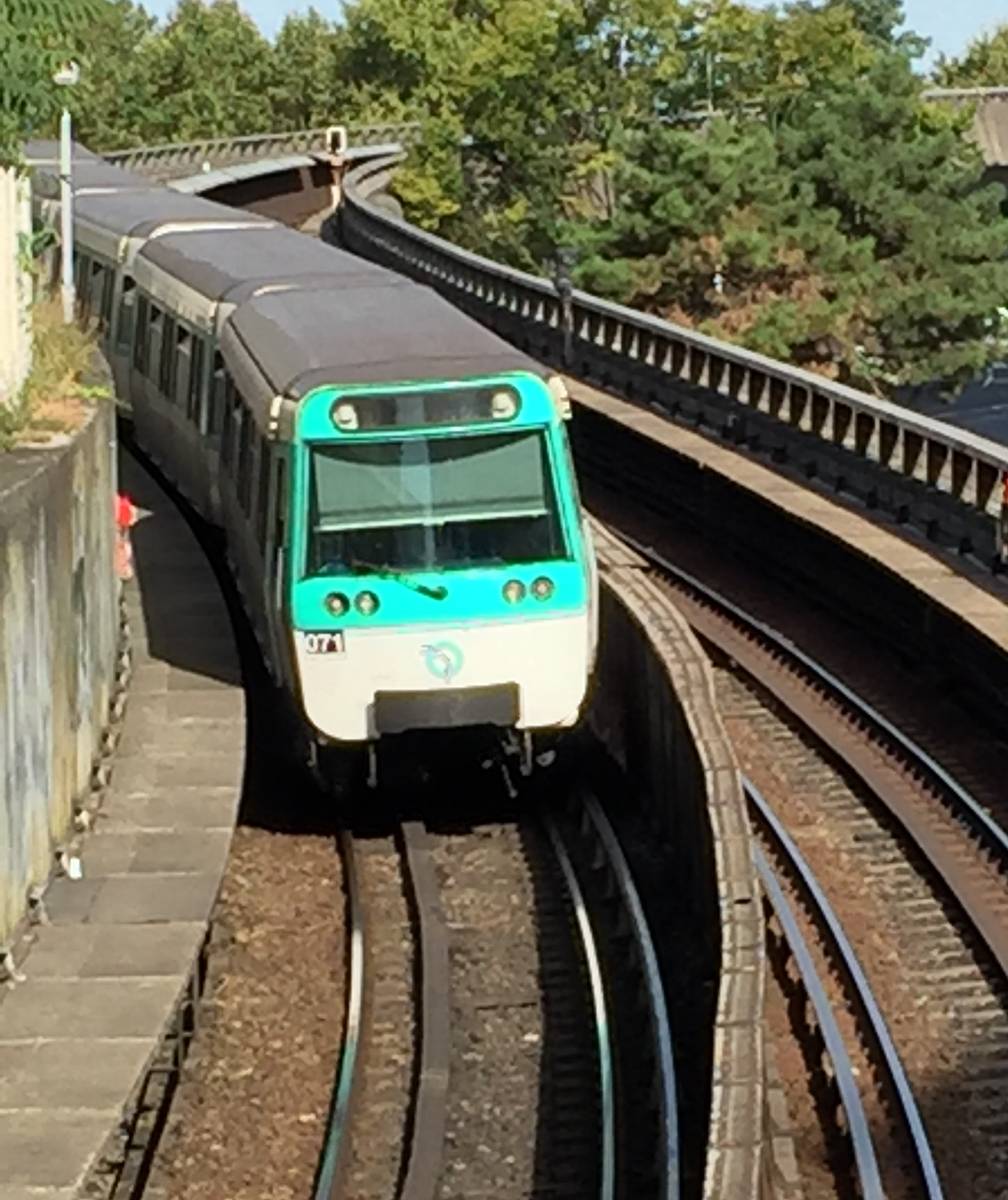 Vue du viaduc de Clichy (franchissant la Seine), pont du métro à la sortie de la station Mairie de Clichy. Une rame approche la station pour entrer à la station Mairie de Clichy.